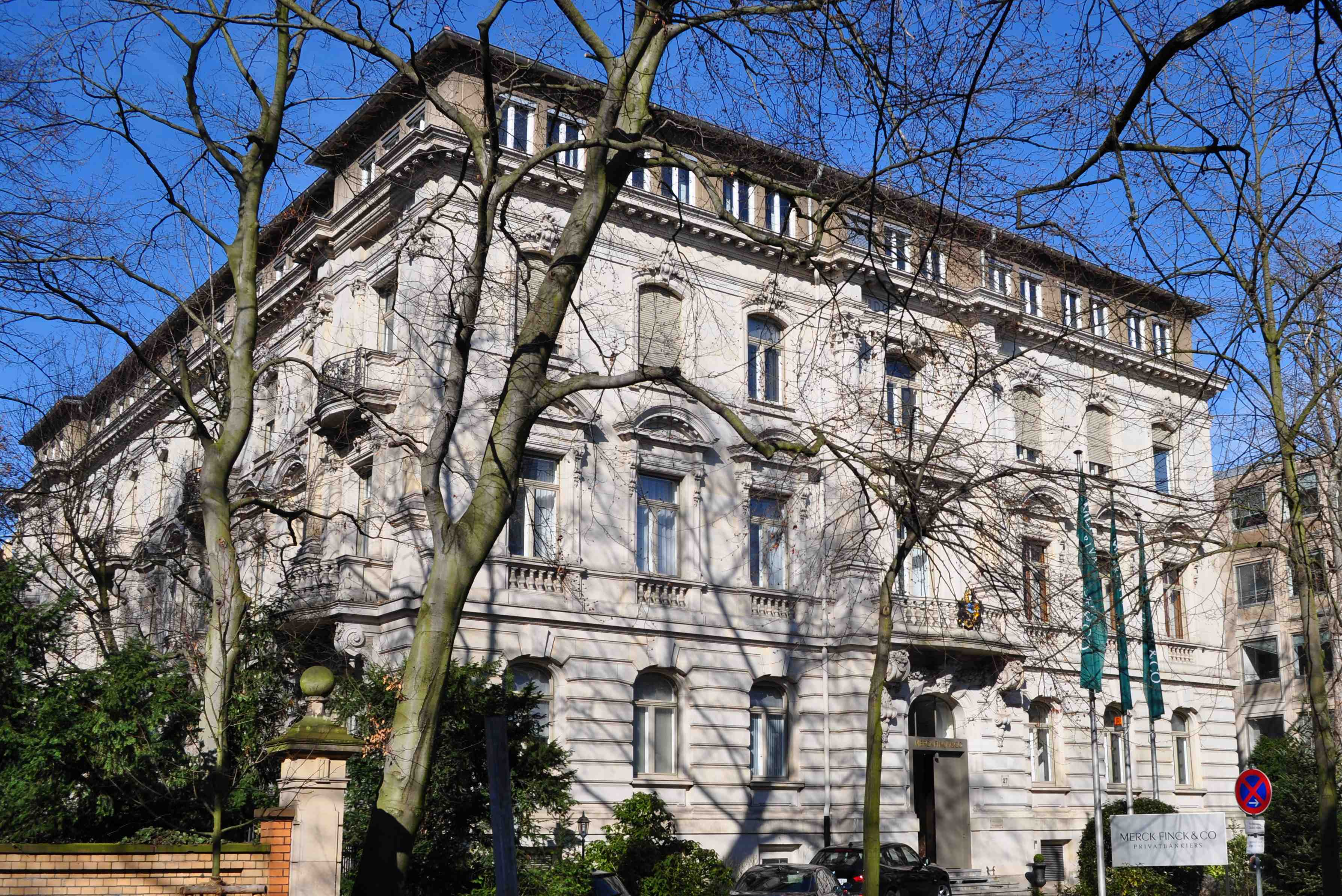 Haus Lindenstrasse 27 in Frankfurt am Main - Frontansicht